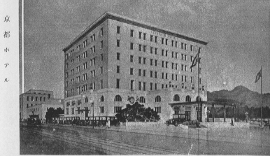 京都ホテル 1932年以前